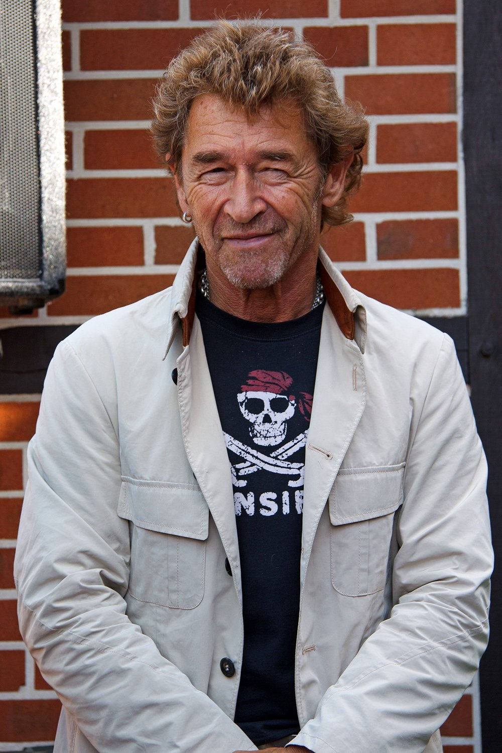 Peter Maffay beim Sommerfest der Otmar Alt Stiftung in Hamm